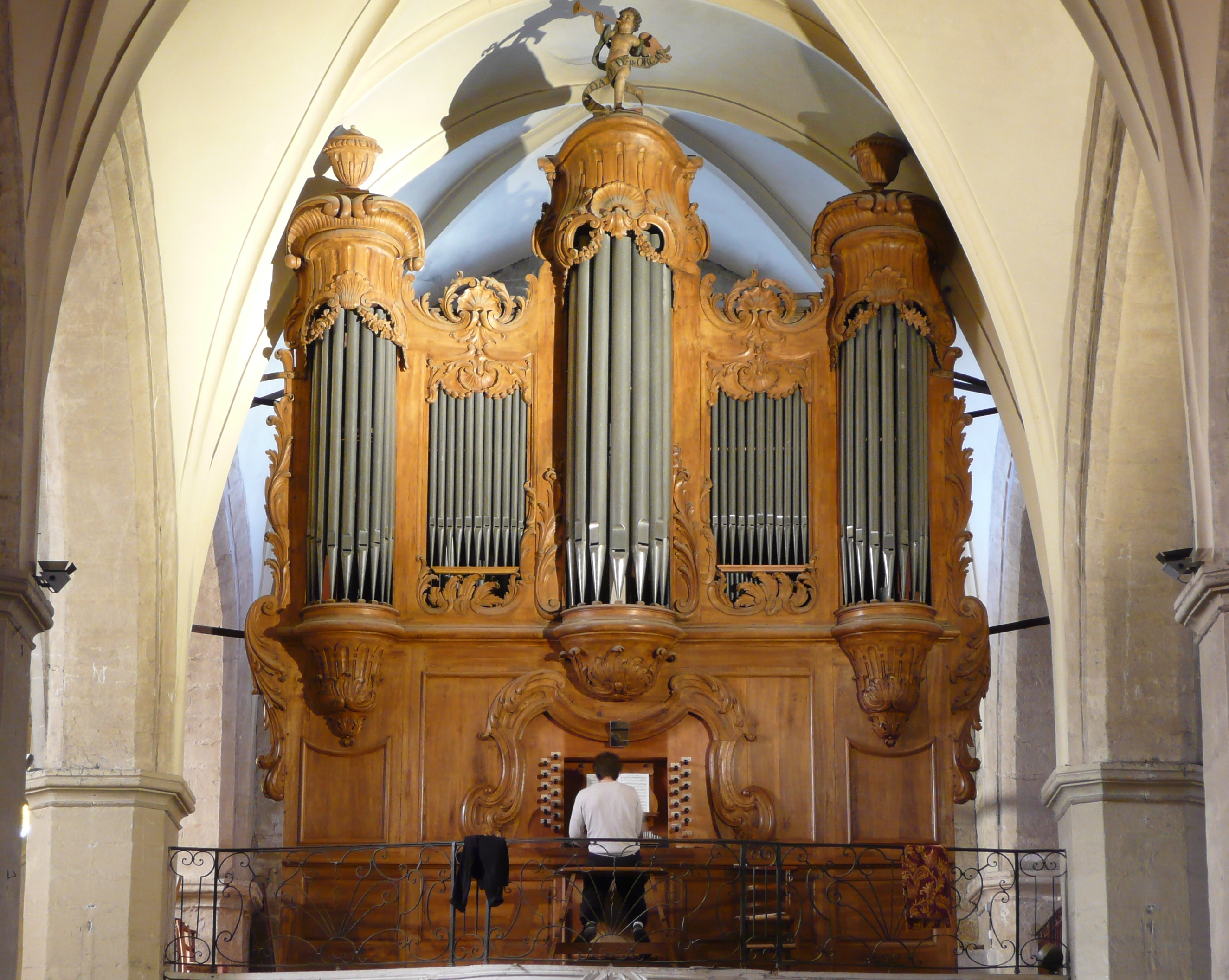 Dans la collégiale St Jean-Baptiste de Roquemaure, un joyau de la facture d'orgue provençale, cas unique où l'instrument est plus ancien que le buffet qui le protège. Construit en 1690 par Barthélémy & Honoré Julien pour les Cordeliers d'Avignon, seul exemplaire du Plein-jeu Renaissance Provençal conservé intact.